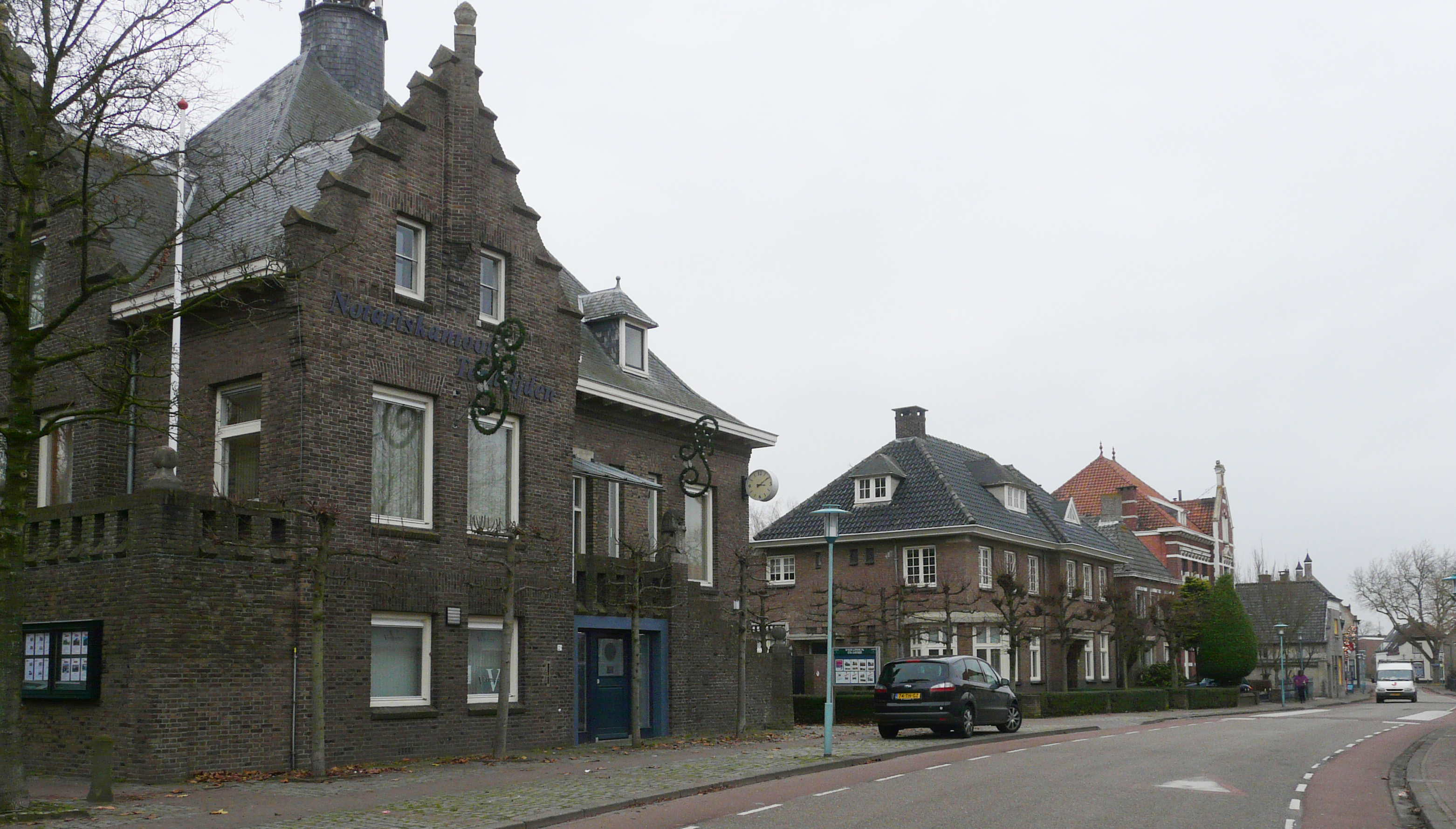 Raadhuisstraat in Terheijden. Links: Raadhuisstraat 2, voormalig raadhuis